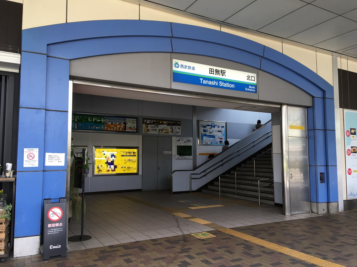 田無駅北口